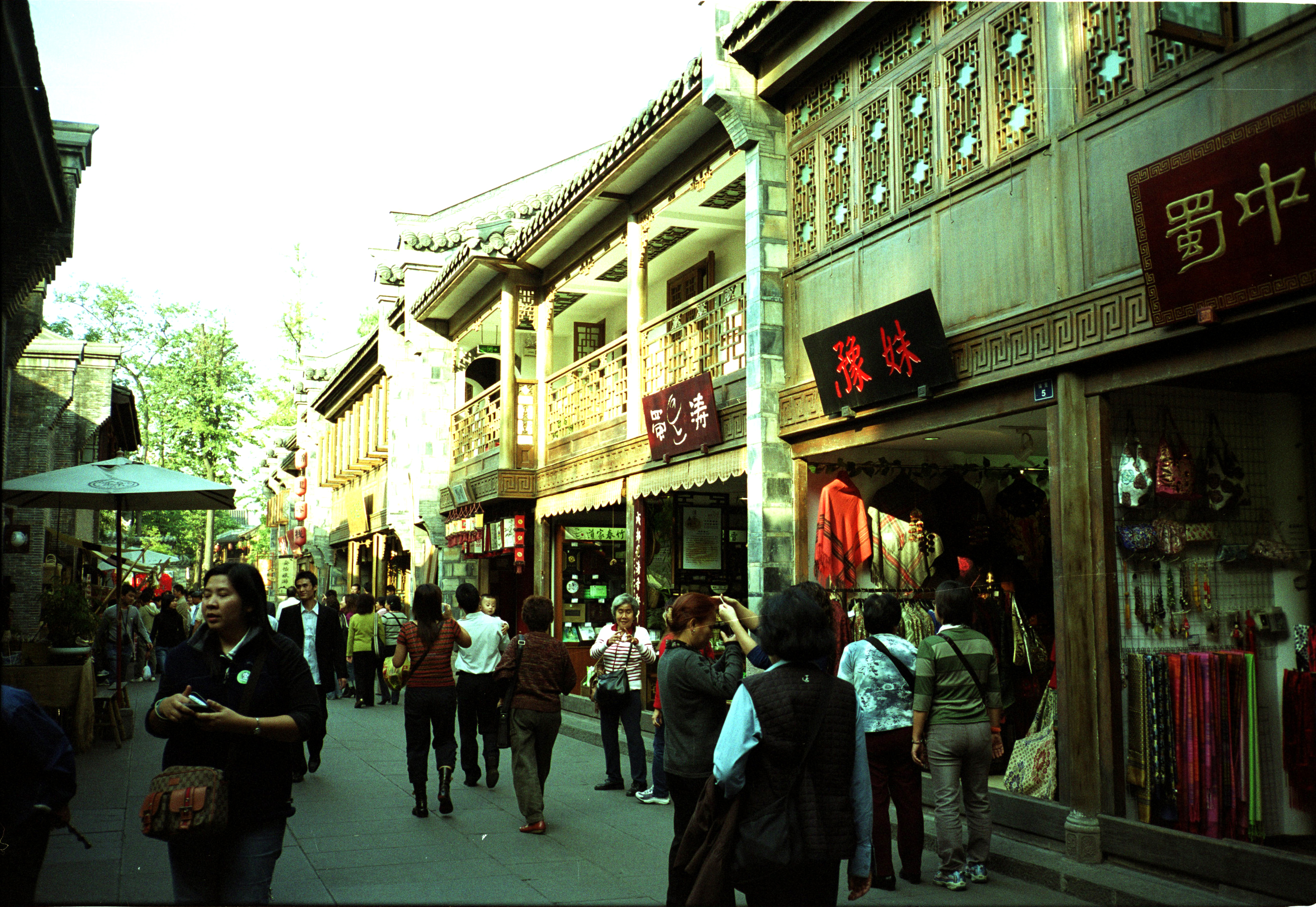 成都锦里古街